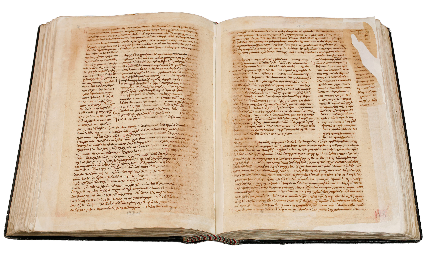 გელათის ბიბლია